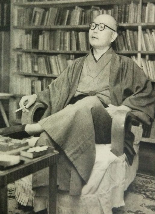 矢部貞治